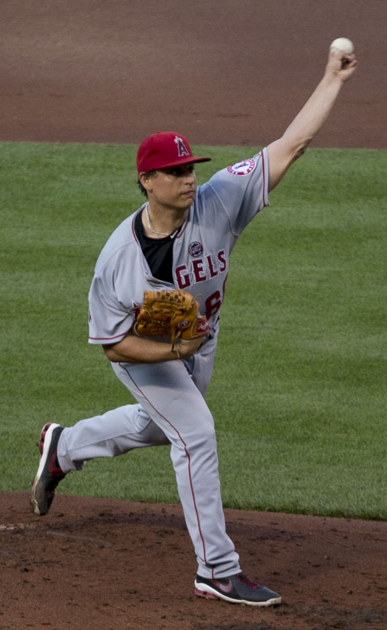 Jason Vargas